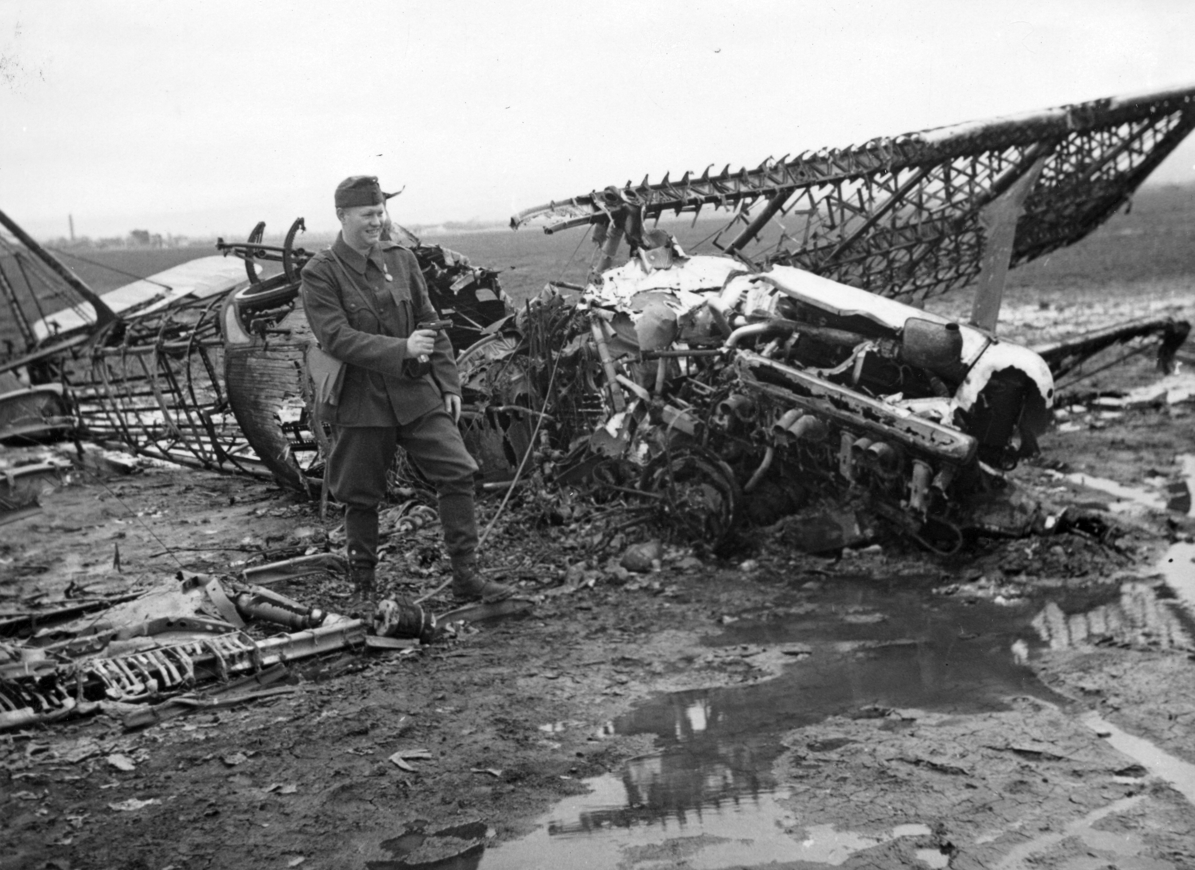 repülőtér bombázás után. Breguet 19-es közel-felderítőgép maradványai. Location: Serbia, Novi Sad Tags: wreck, Breuget-brand, French brand Title: repülőtér bombázás után. Breguet 19-es közel-felderítőgép maradványai.